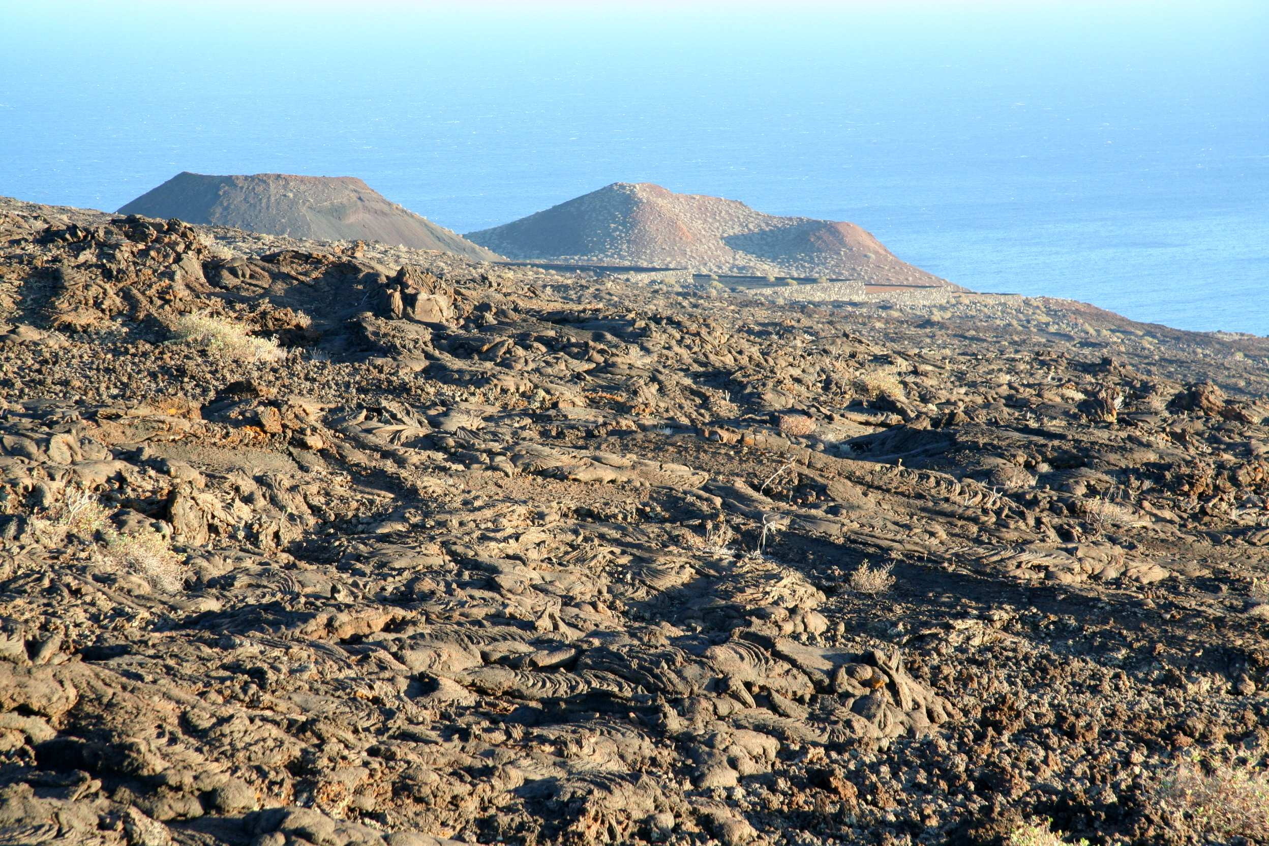 El Lajal, Erstarrte Lava